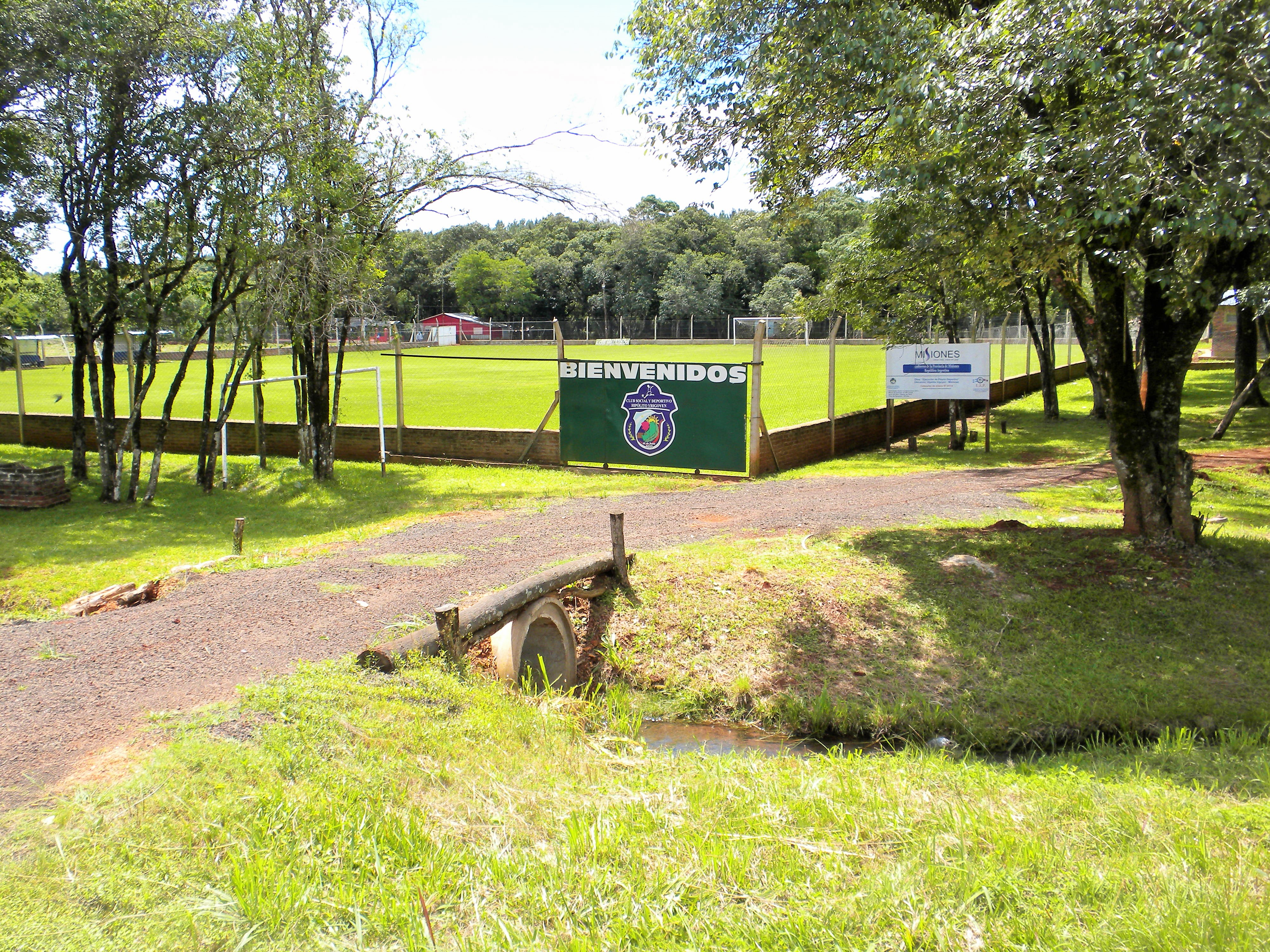 Club Social y Deportivo Hipólito Yrigoyen (sobre Ruta Nacional 12). Hipólito Yrigoyen, Provincia de Misiones, Argentina. Fuenteː Periodista Horacio Cambeiro.